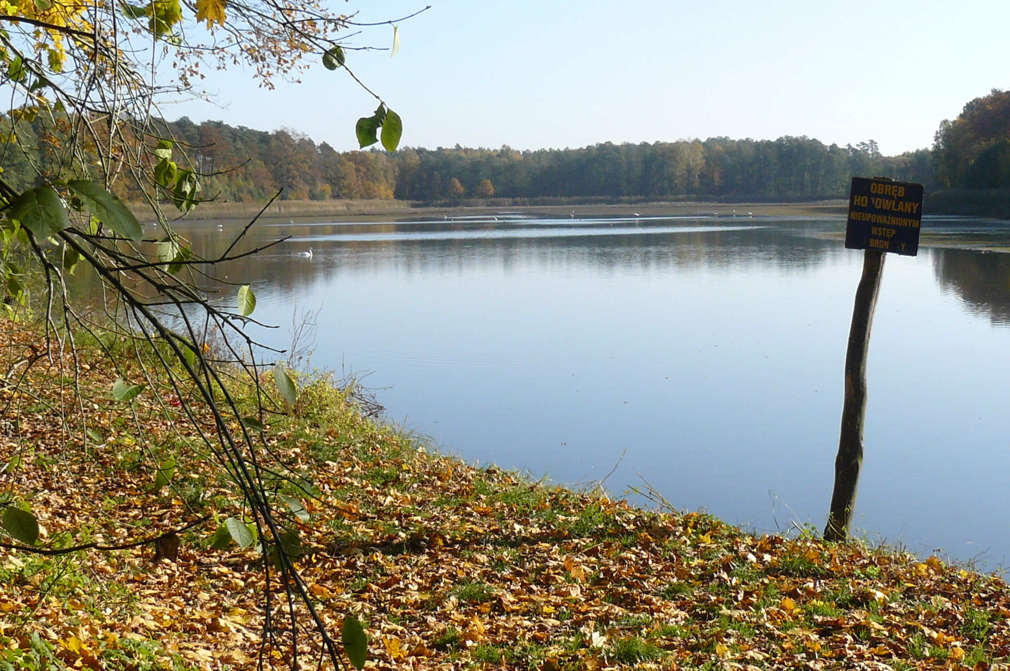 Staw Węgielnik w pobliżu Ostatniego Grosza - Obszar Chronionego Krajobrazu Dąbrowy Krotoszyńskie i Baszków-Rochy.